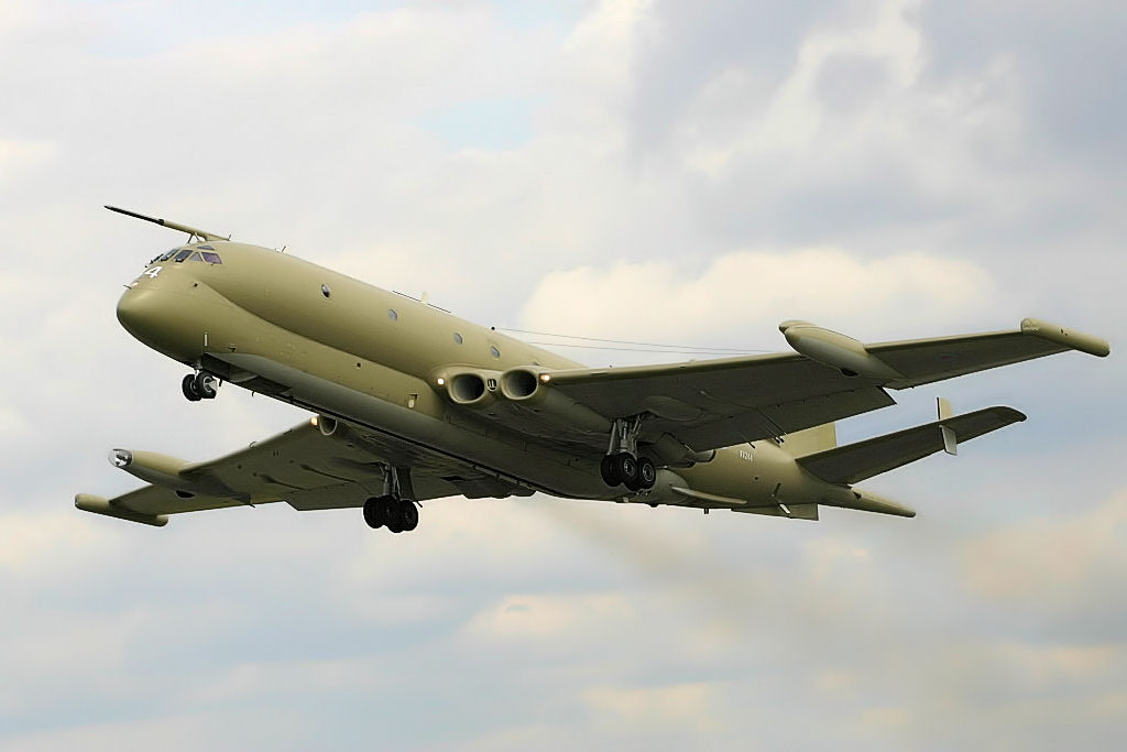 Nimrod - RIAT 2004